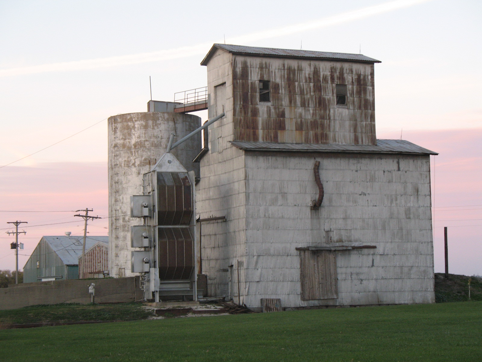 Grain elevator in Cheneyville, Illinois